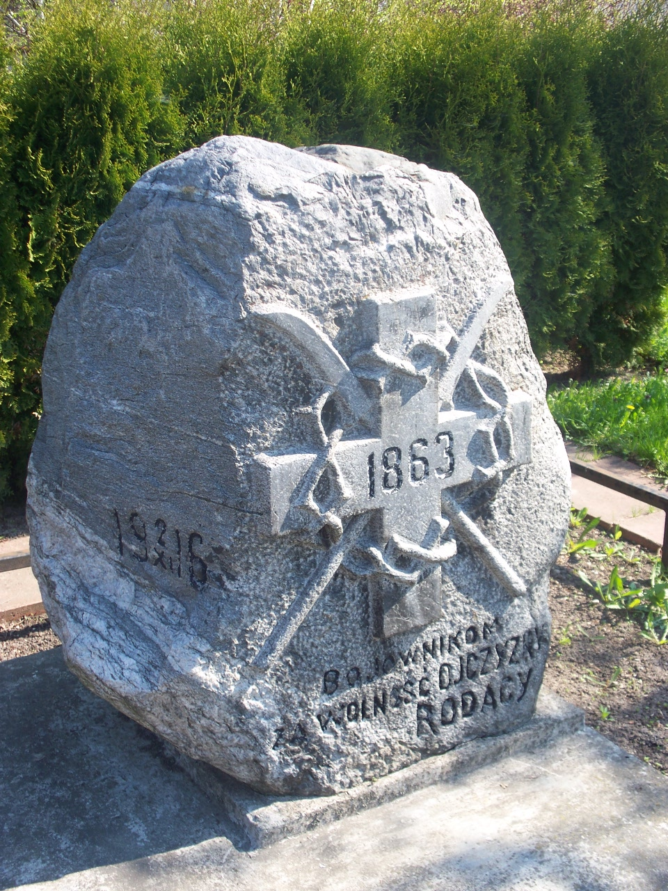 Pomnik ten znajduje się przy ul. Szosa Zambrowska. W tym miejscu dokonano egzekucji bojowników Powstania Styczniowego z 1863 roku. Dla upamiętnienia ofiar tych wydarzeń mieszkańcy Łomży stawiali tu drewniane krzyże. Z inicjatywy fotografa łomżyńskiego E. Zajączkowskiego w miejscu pochówku postawiono okolicznościowy głaz –pomnik. Jego uroczyste poświęcenie odbyło się 2 listopada 1916 roku.